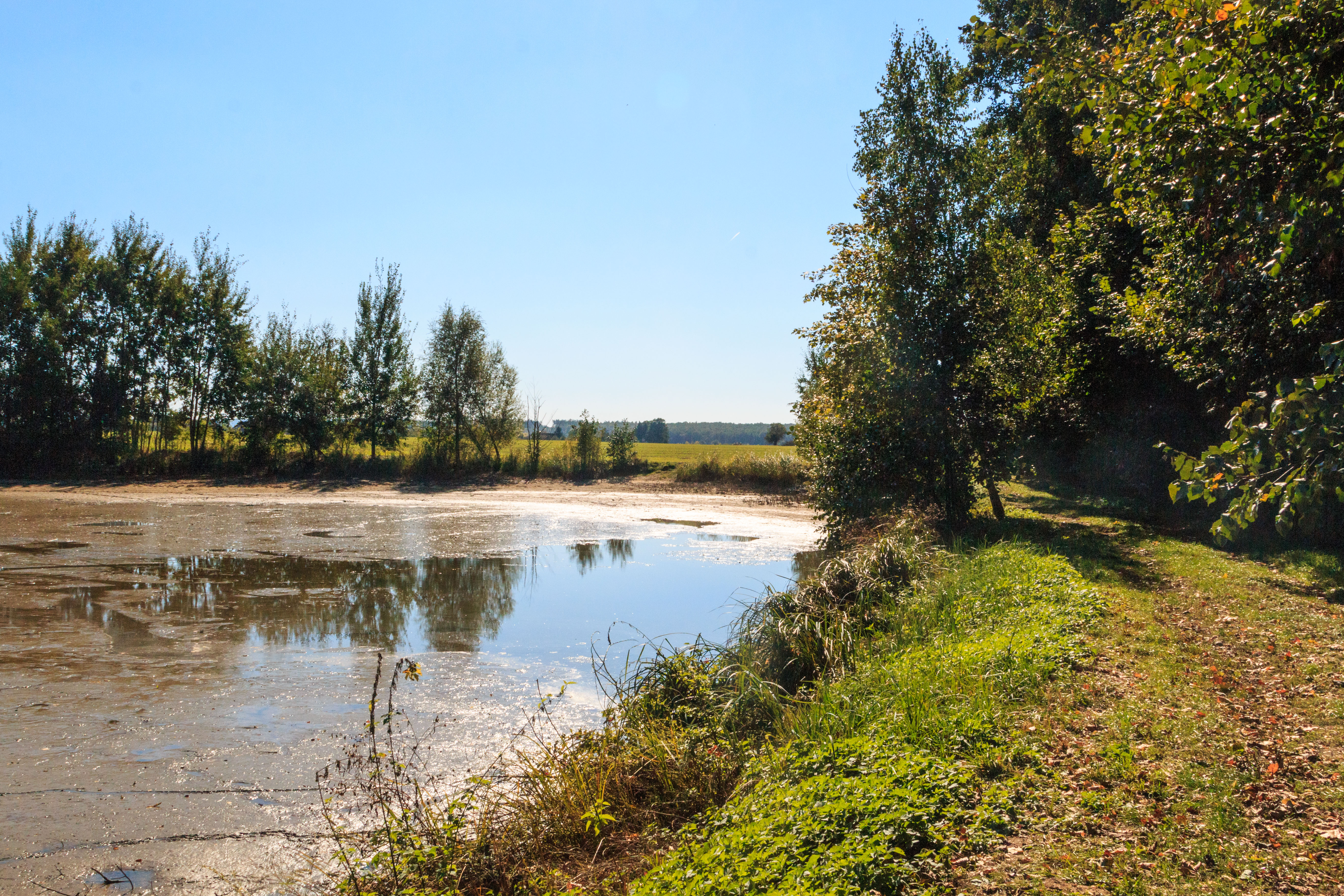 Rybník Lomenďák u Kněžmostu Project: Vodstvo.